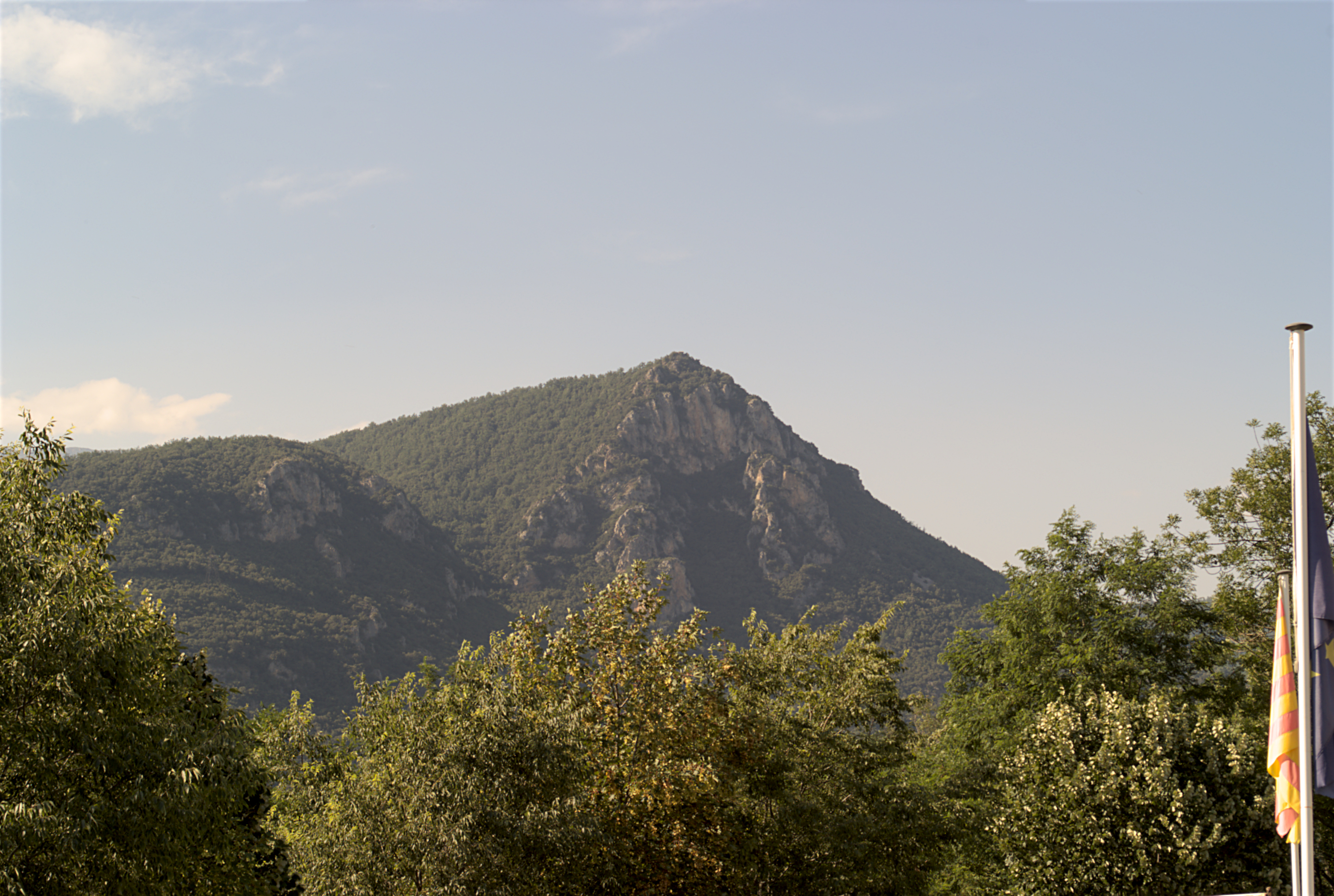 Roc de Cos depuis de la rue Paul Sentena, Serralongue (Pyrénées-Orientales, Languedoc-Roussillon, France)